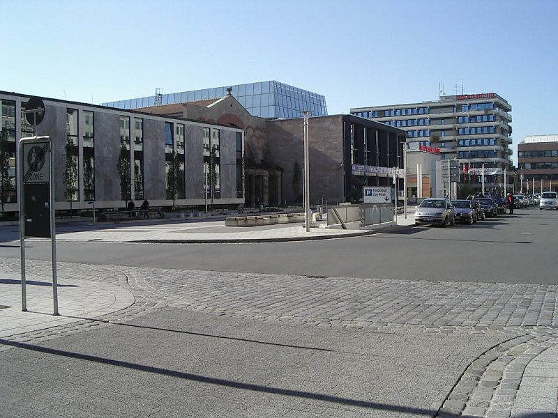 Nürnberg, Germanisches Nationalmuseum, Ansicht vom Kornmarkt, v. NO (Okt. 2003). Zu sehen ist, von links nach rechts (O nach W): Heuß-Bau, Alter Eingang, Bibliotheksbau. Im Vordergrund modernes Straßenplaster, einbetoniert.